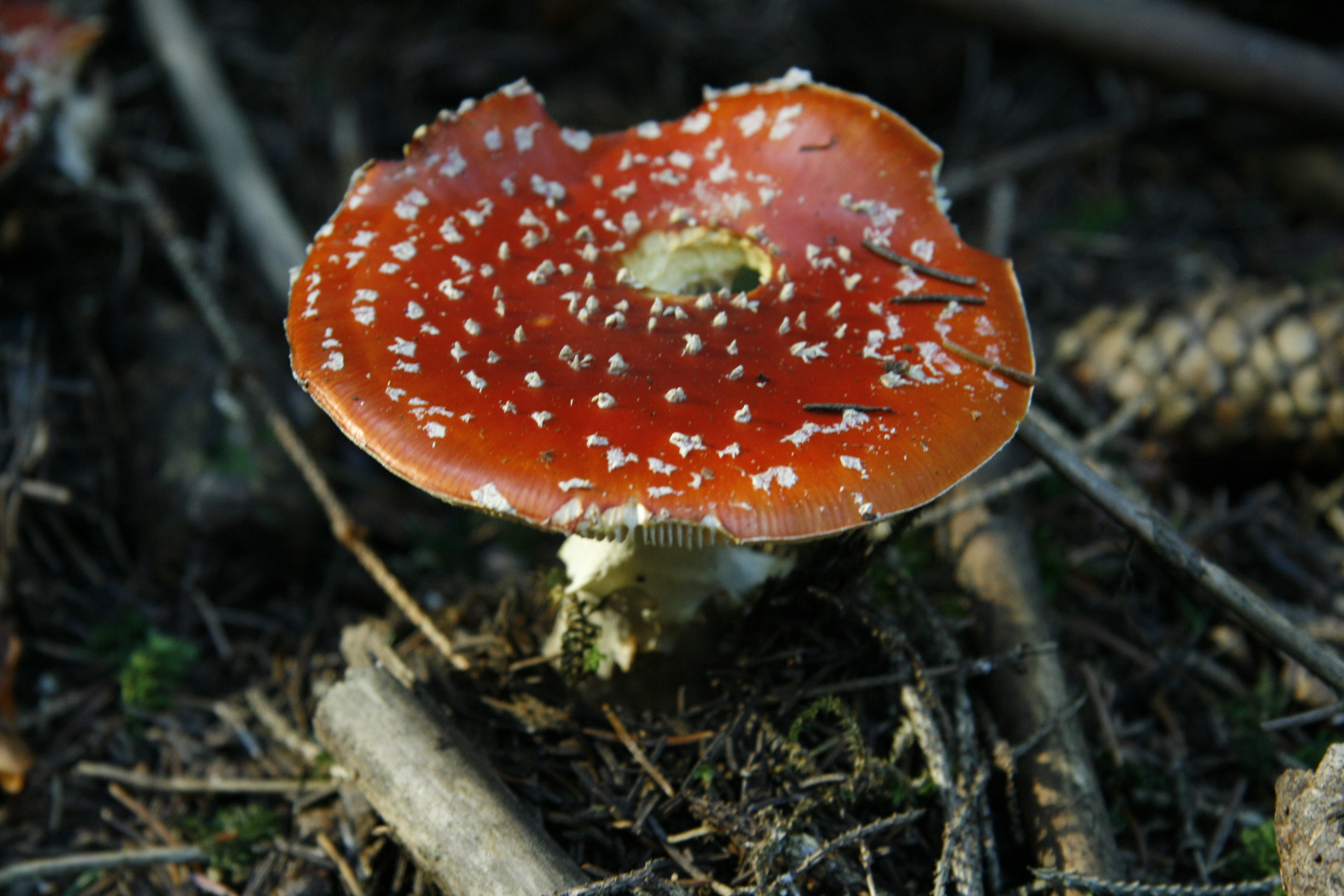 Amanita muscaria